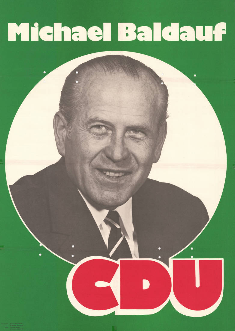 Michael Baldauf CDUAbbildung:PorträtfotoPlakatart:Kandidaten-/Personenplakat mit PorträtAuftraggeber:CDU in Niedersachsen, HannoverDrucker_Druckart_Druckort:Gebrüder Jänecke, HannoverObjekt-Signatur:10-008 : 304Bestand:Landtagswahlplakate Niedersachsen (10-008)GliederungBestand10-18:Landtagswahlplakate Niedersachsen (10-008) » CDULizenz:KAS/ACDP 10-008 : 304 CC-BY-SA 3.0 DE